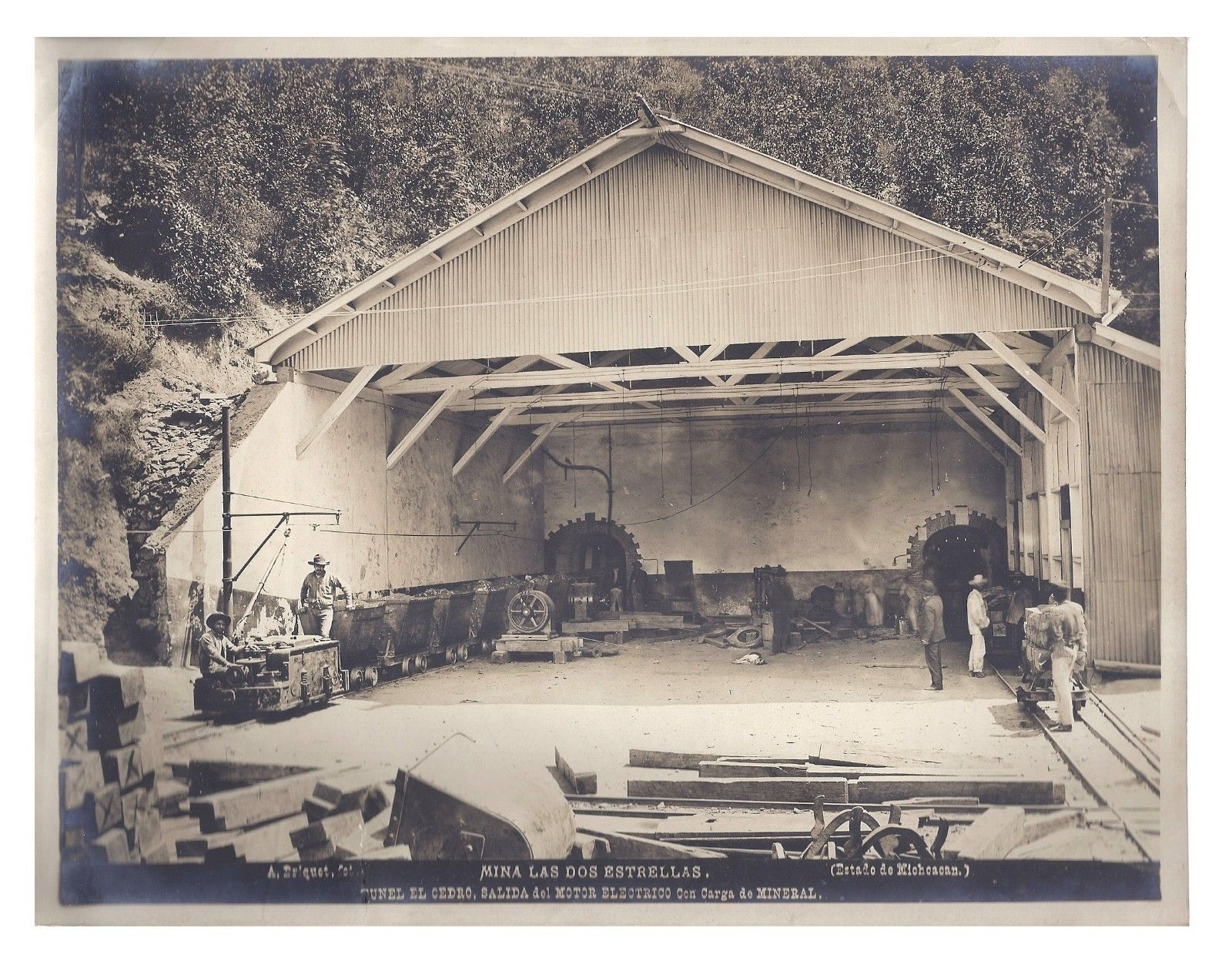 Dos Estrellas Mine